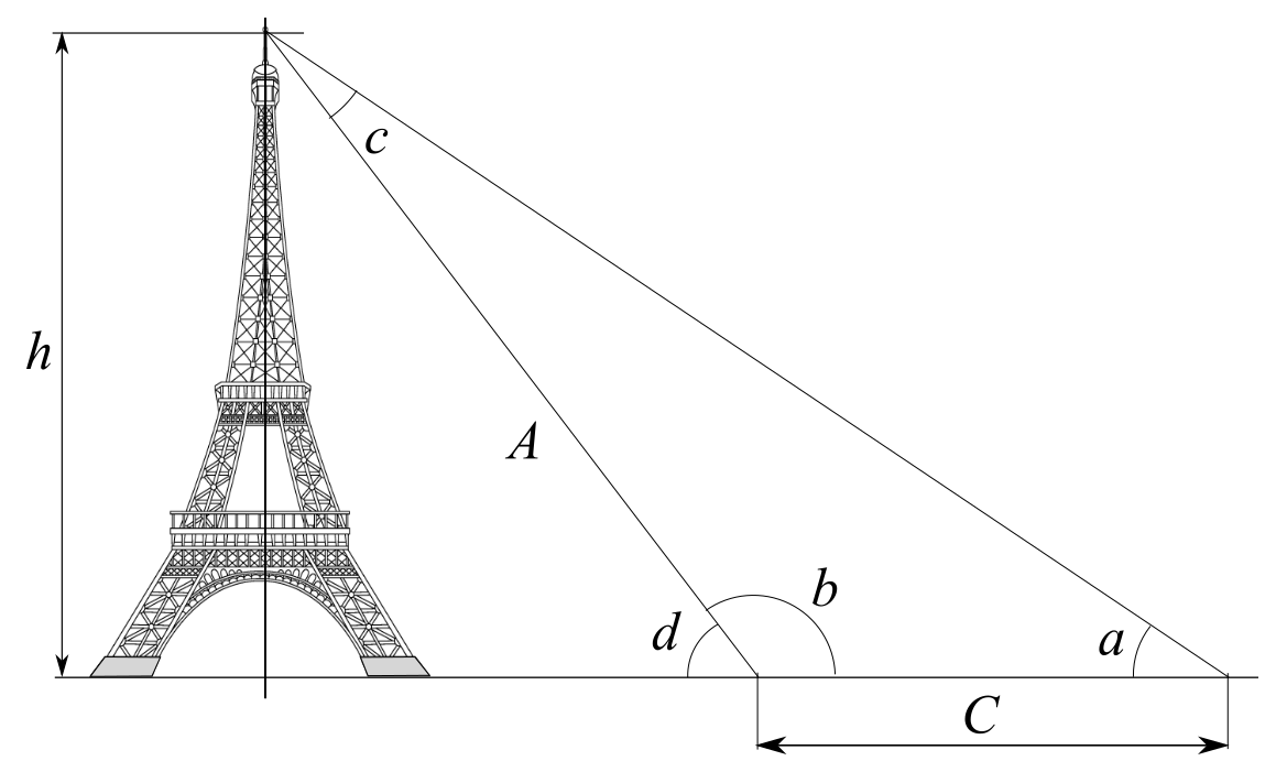 Triangulering